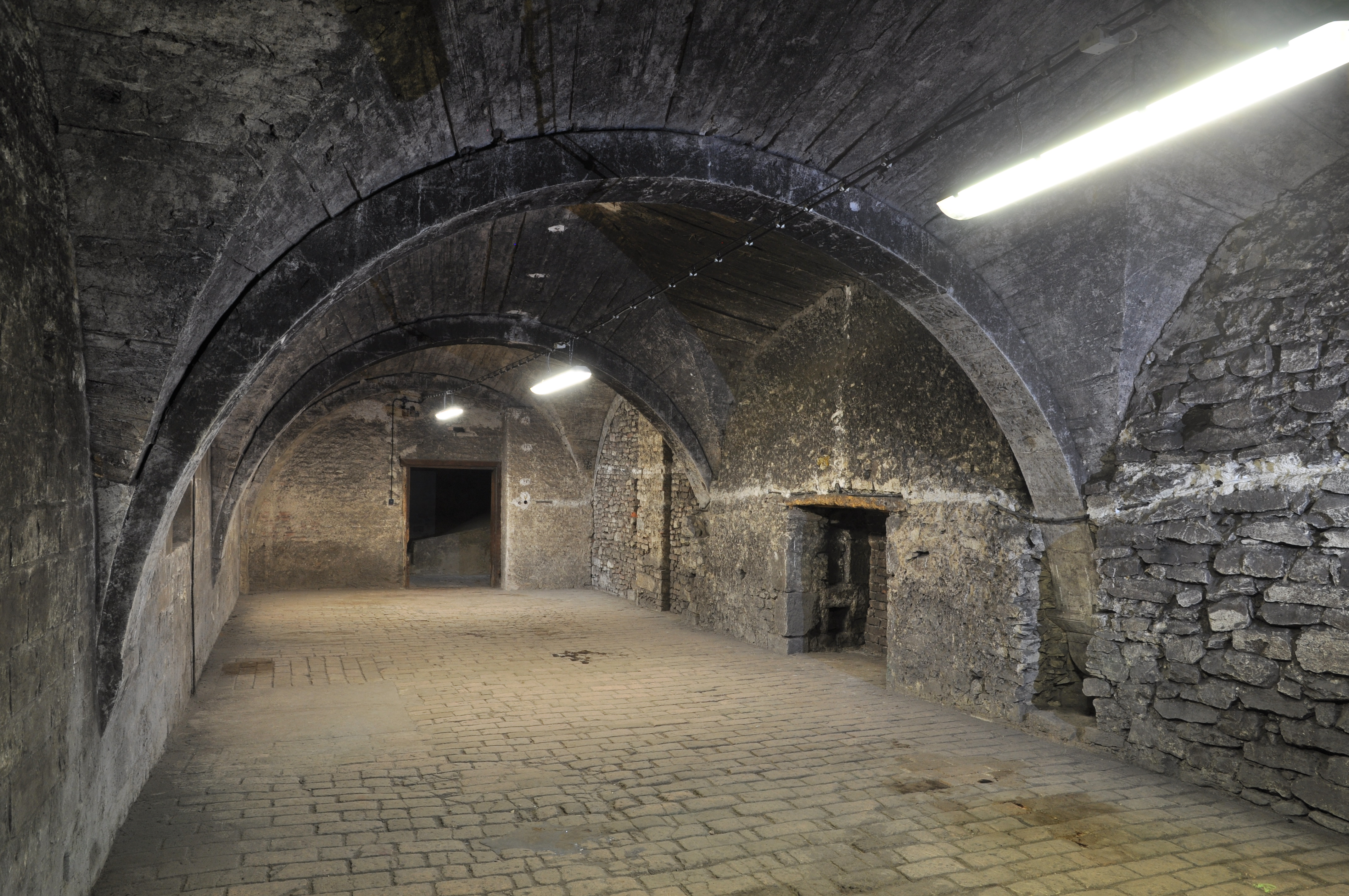 Interiér románského paláce biskupského hradu v Roudnici nad Labem